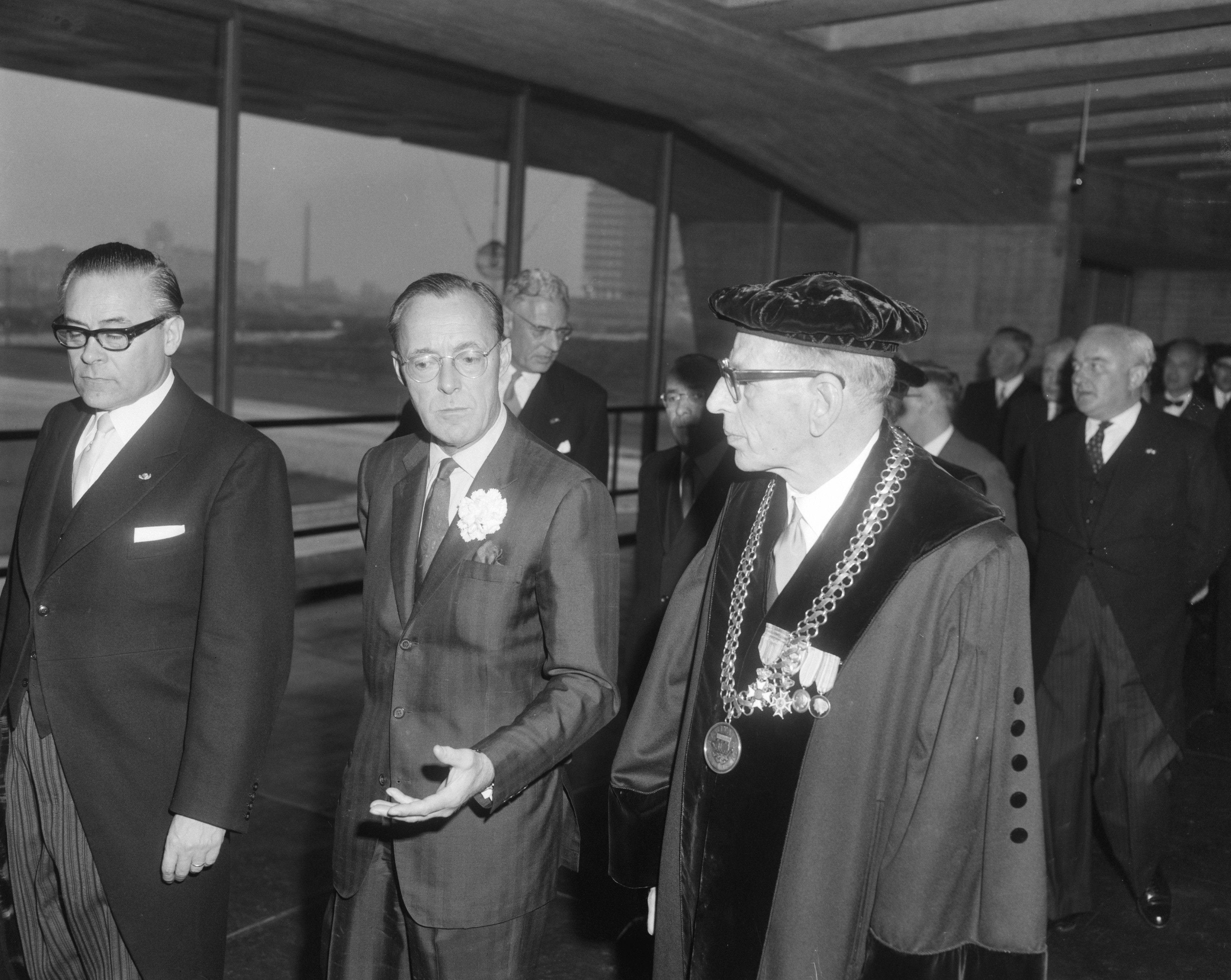 Opening Auditorium van de TH te Eindhoven, v.l.n.r. ir. H.B.J. Witte (President-curator van de TH), prins Bernhard , prof. dr. K. Posthumus. Datum 27 april 1966